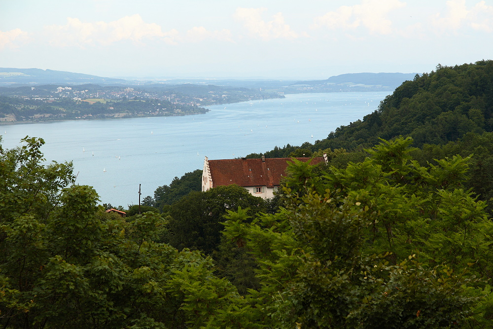 Ruine Bodman, Blick von Ruine Bodman über das Kloster Frauenberg Richtung Überlingen. Nordwestlicher Bodensee.